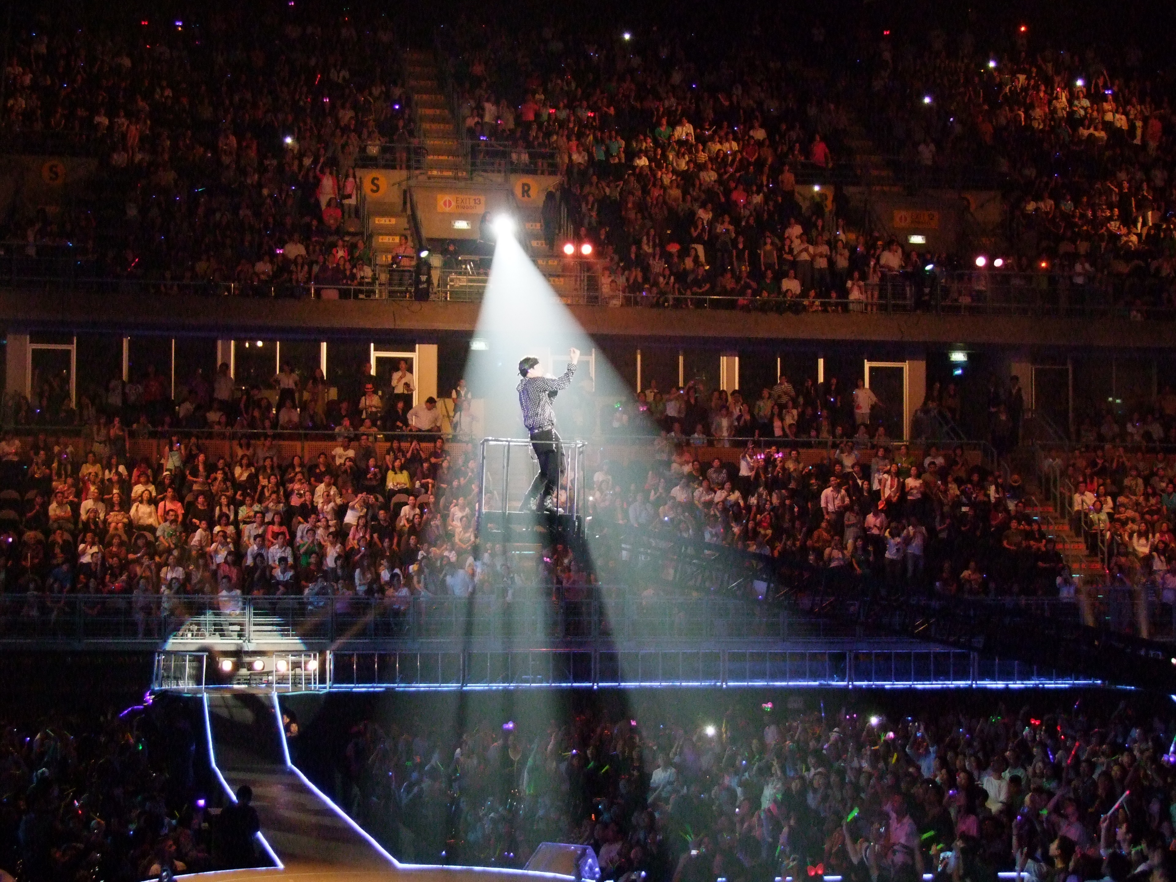 ธงไชย แมคอินไตย์ ขึ้นเครนยกในคอนเสิร์ตเบิร์ดอาสาสนุก 25 กุมภาพันธ์ 2554